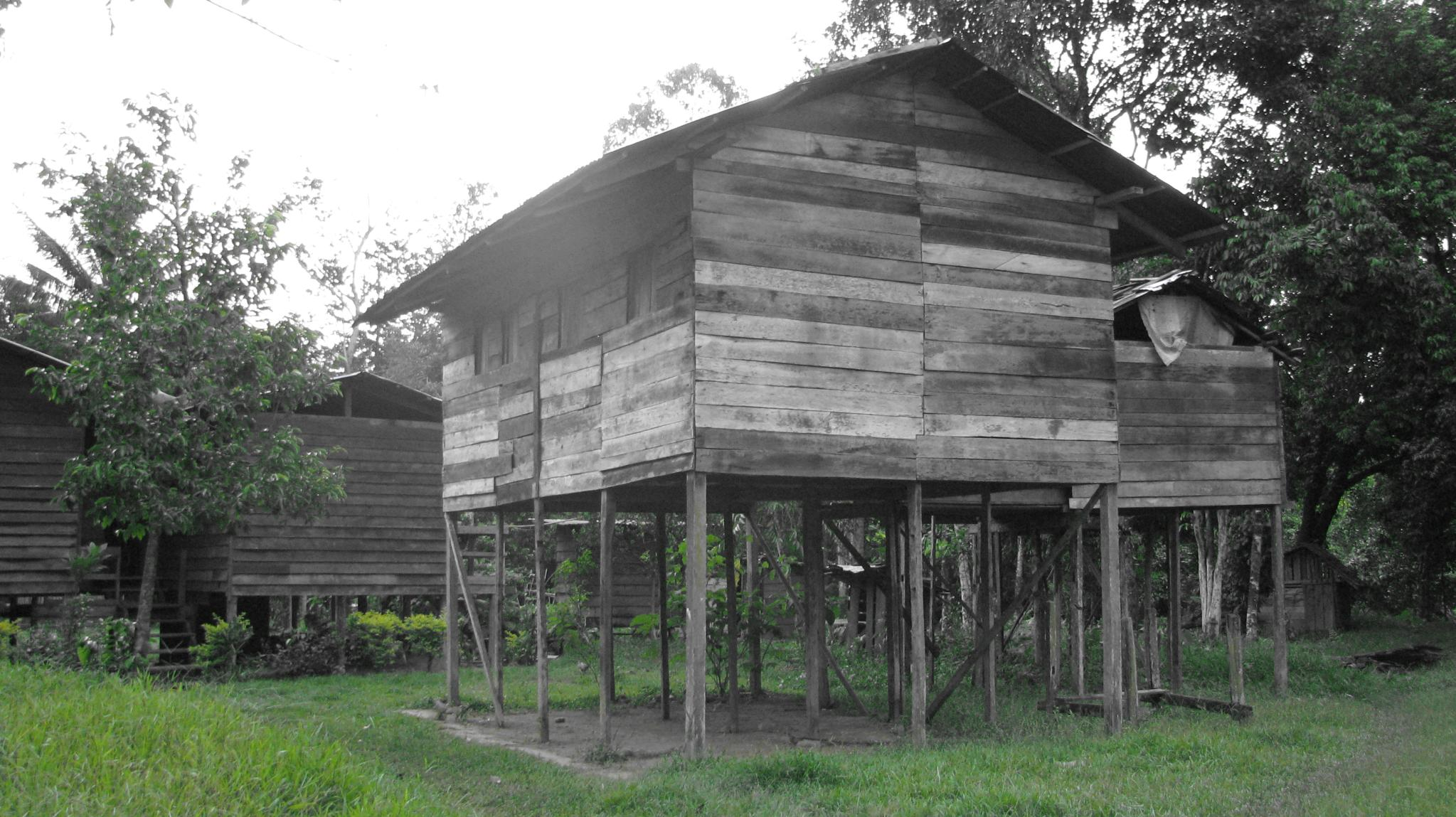 ulu baram